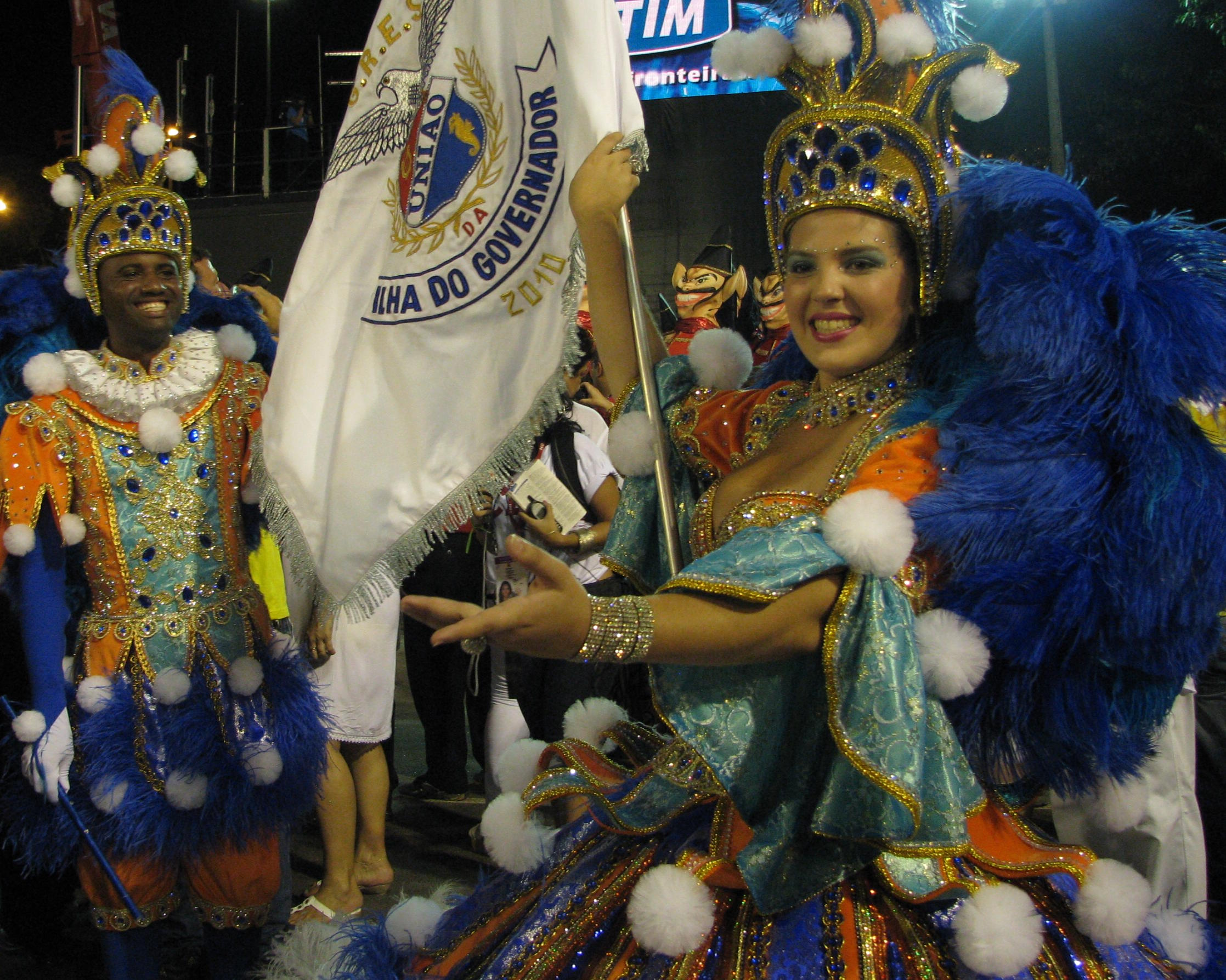 Carnaval 2010 -Uniao da Ilha 24